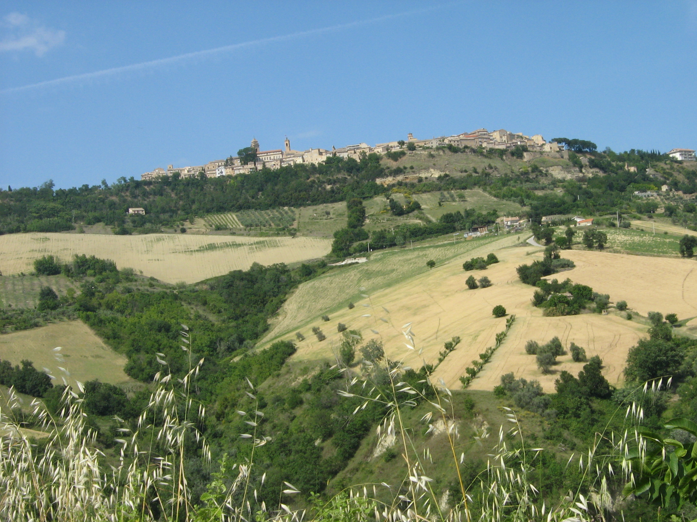 autore: Paola Cartacci